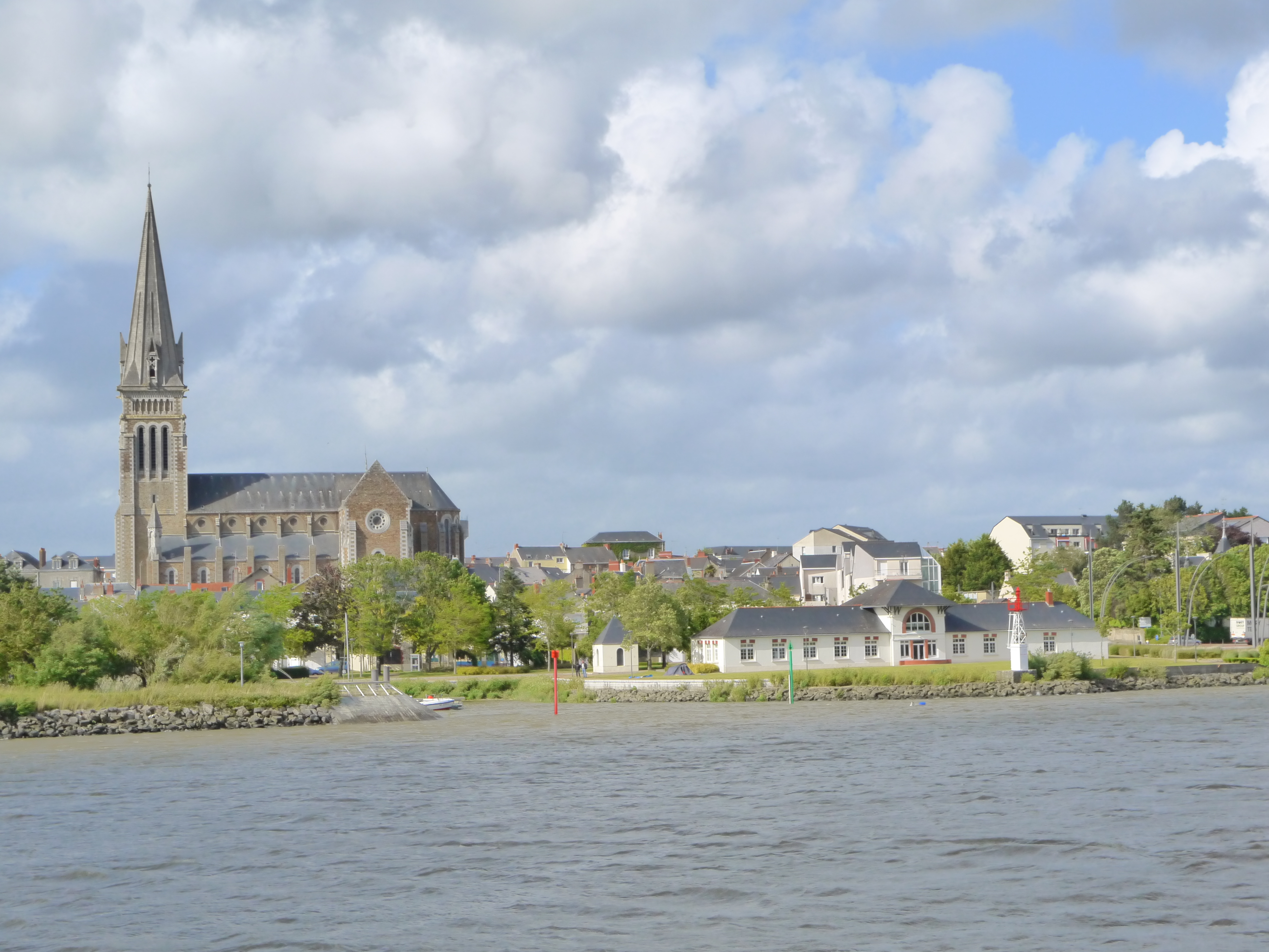 La ville et l'église de Couëron vue de la Loire